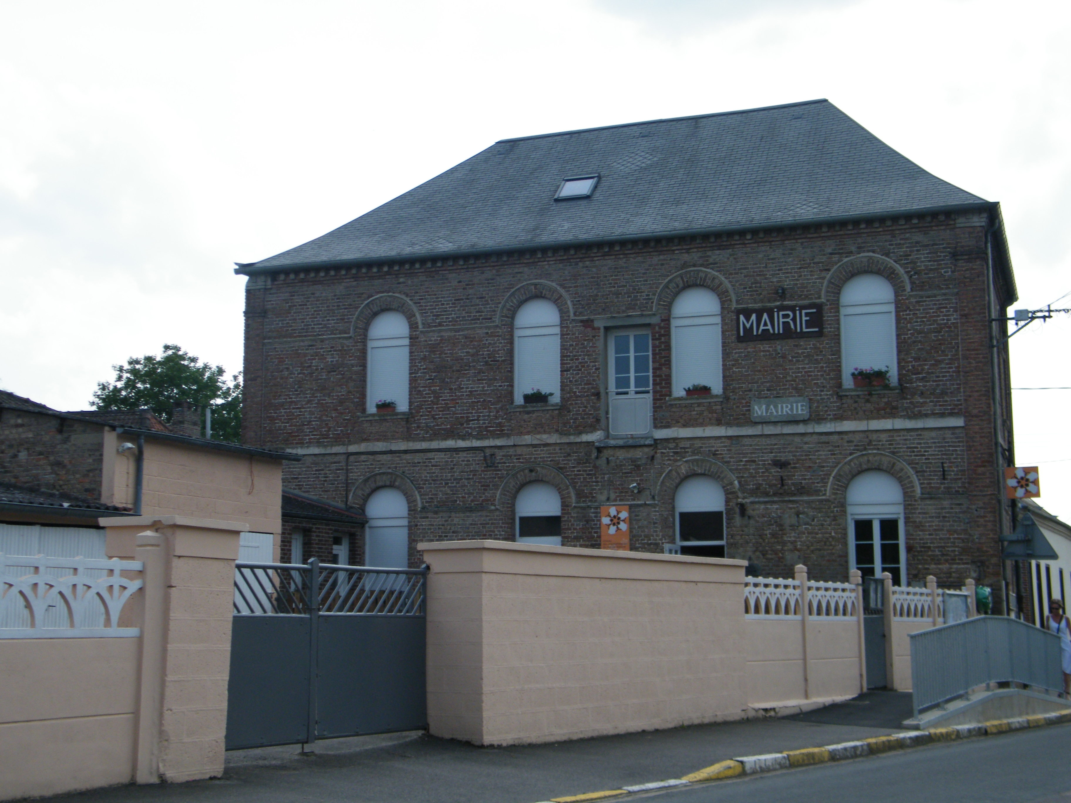 école.